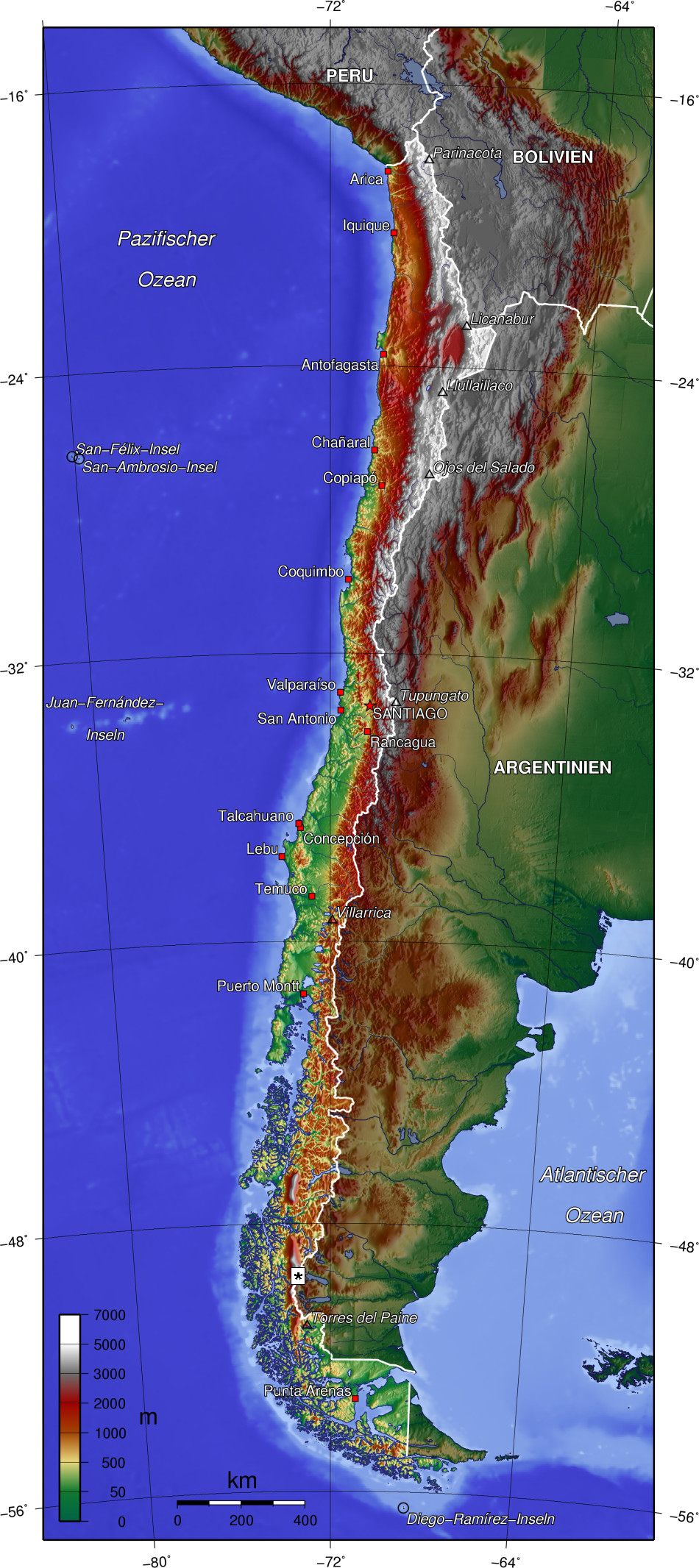 Topografische Karte von Chile